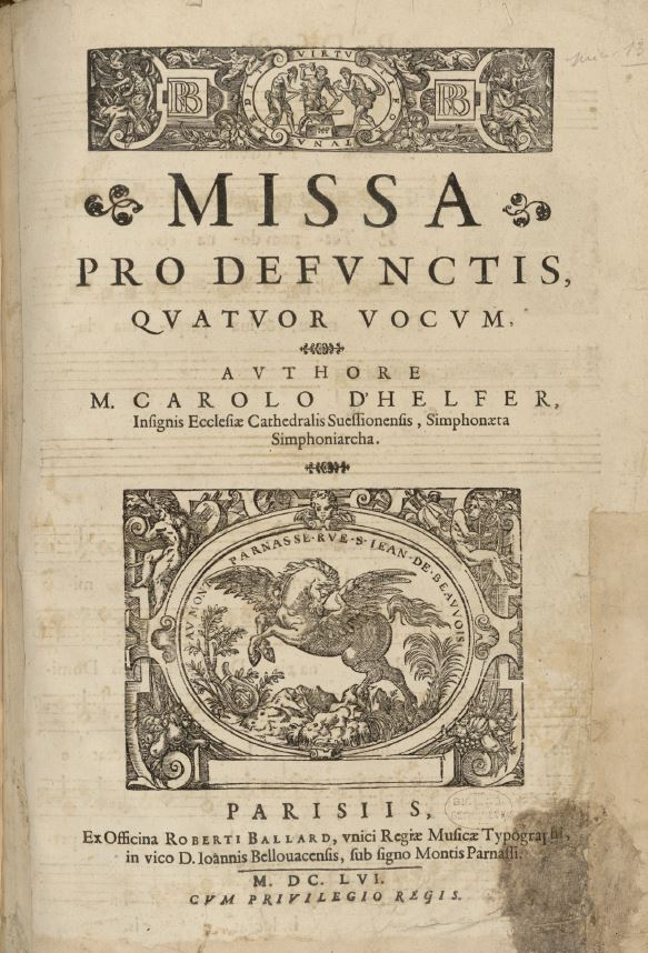 Title page of Charles d'Helfer - Missa pro defunctis (Paris, 1656)